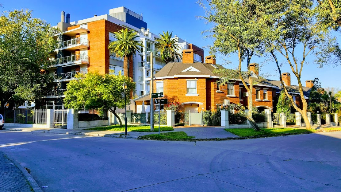 Zona residencial del Prado, Montevideo, Uruguay